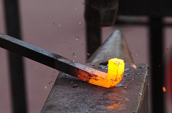 Forja de una pieza en un yunque, en la feria medieval de Berango-Bizkaia.